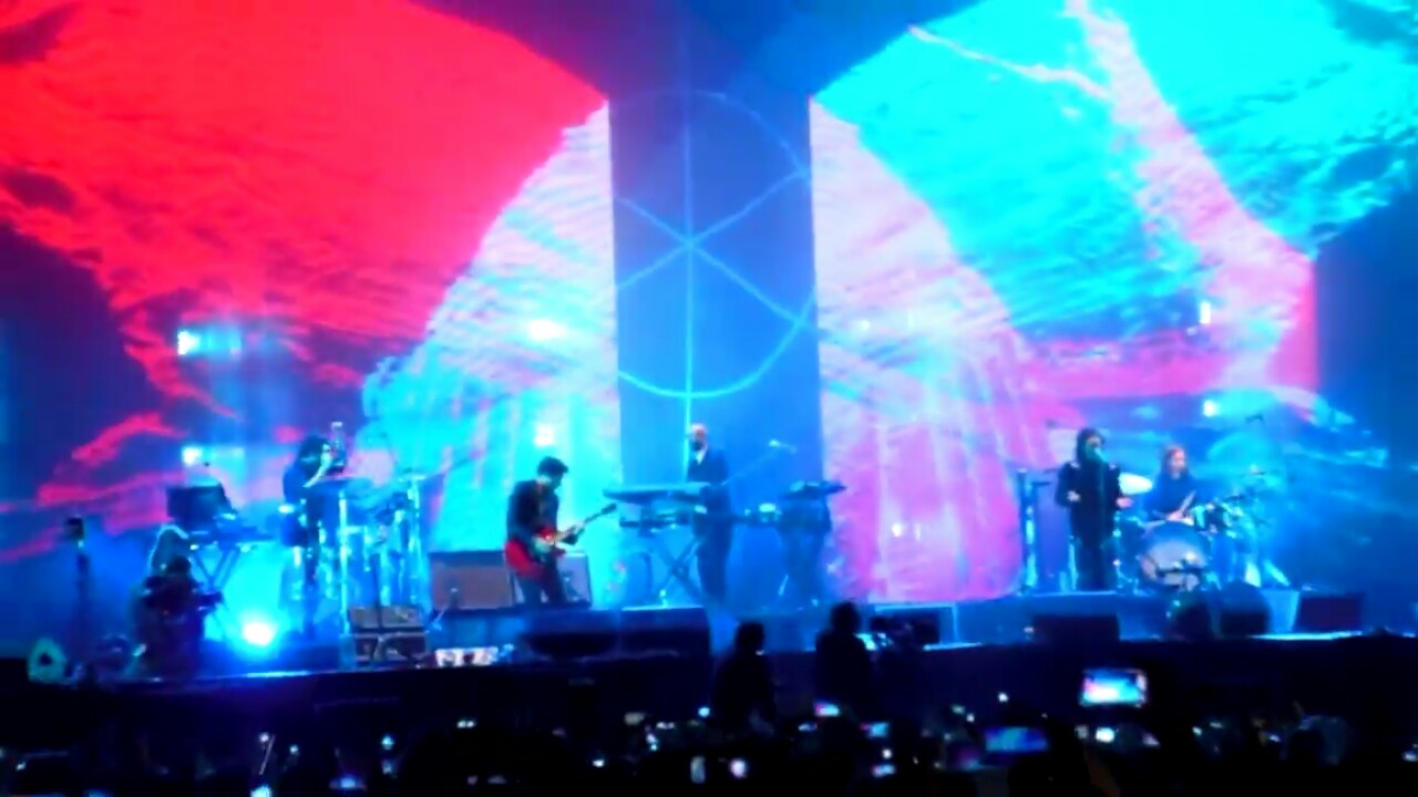 Zoé Tocando Nada, en Vivo Desde el Foro Sol